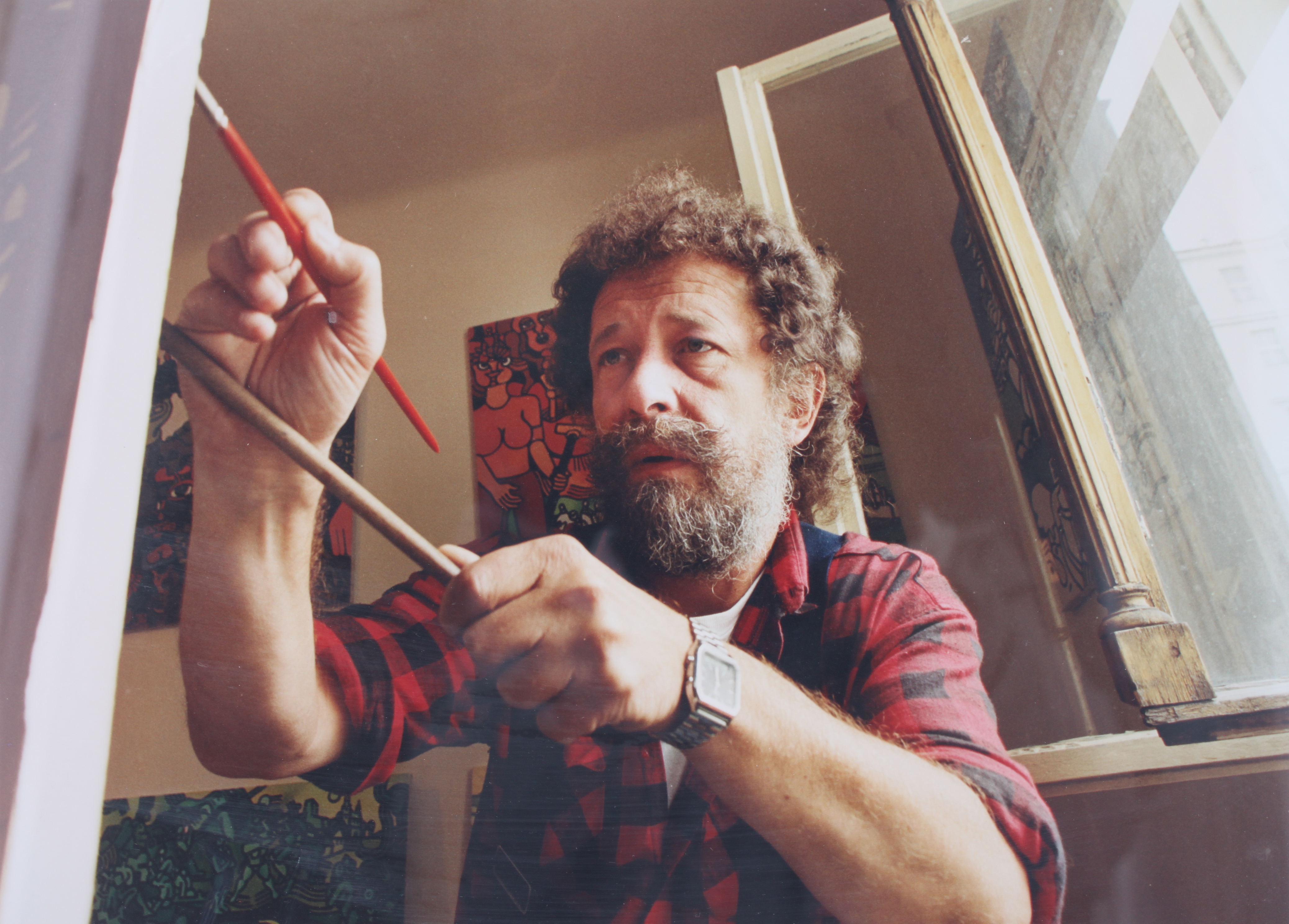 Portraitfoto Macku